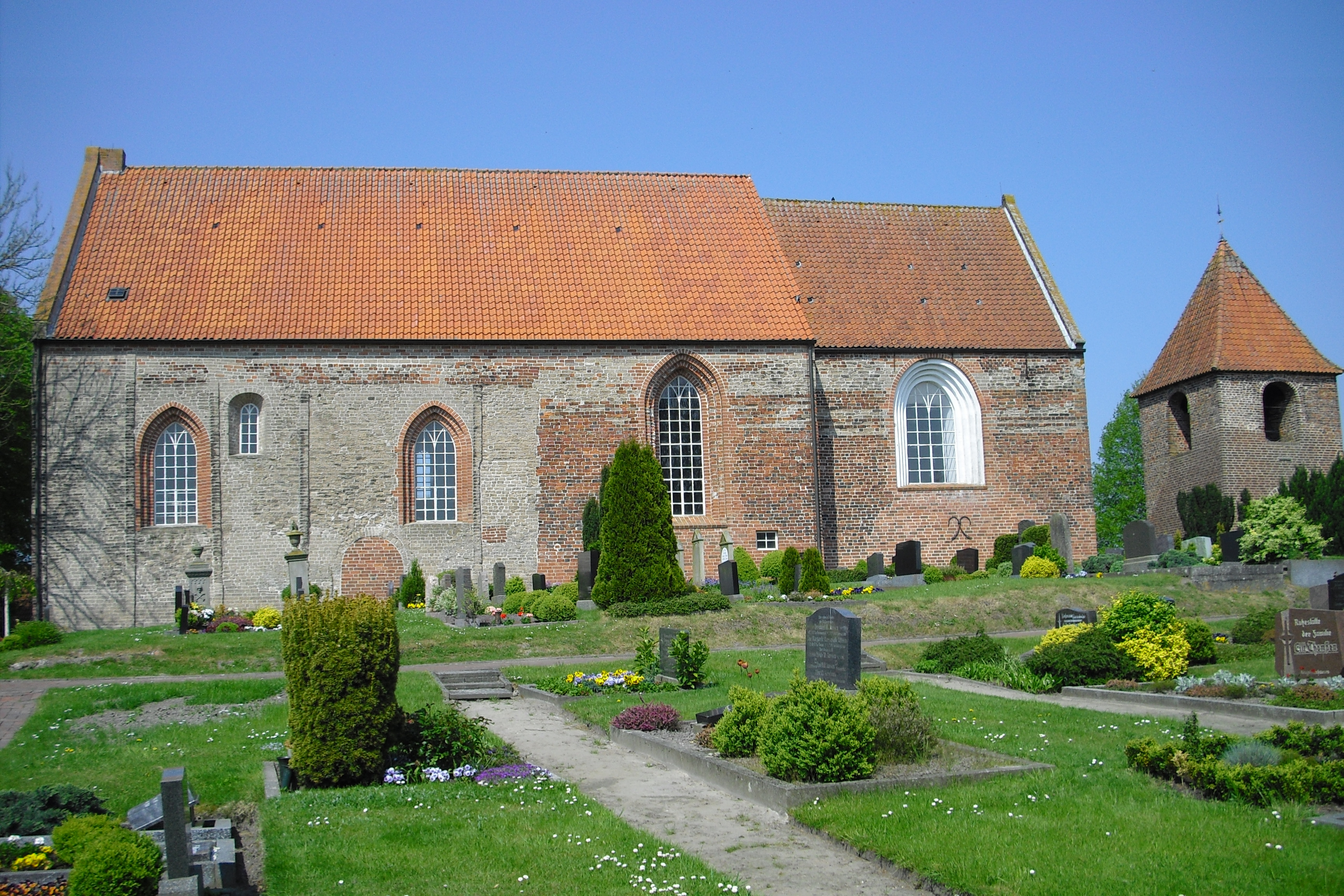 St. Ägidien-Kirche Stedesdorf, Samtgemeinde Esens